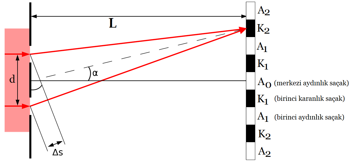 Young deneyinde aydınlık ve karanlık saçaklar